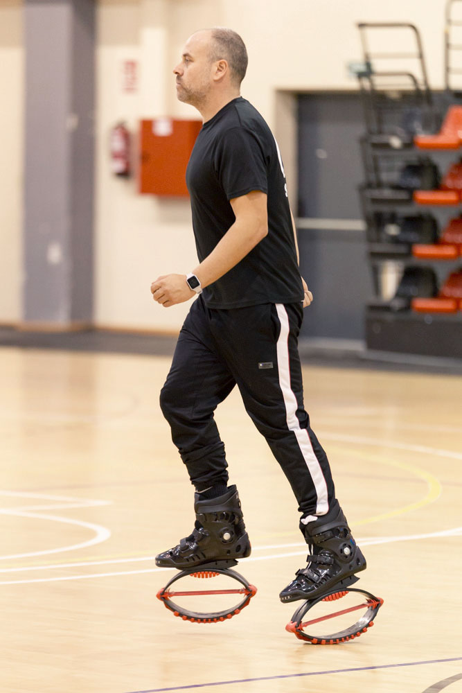 Jumpers in We Jump Fest